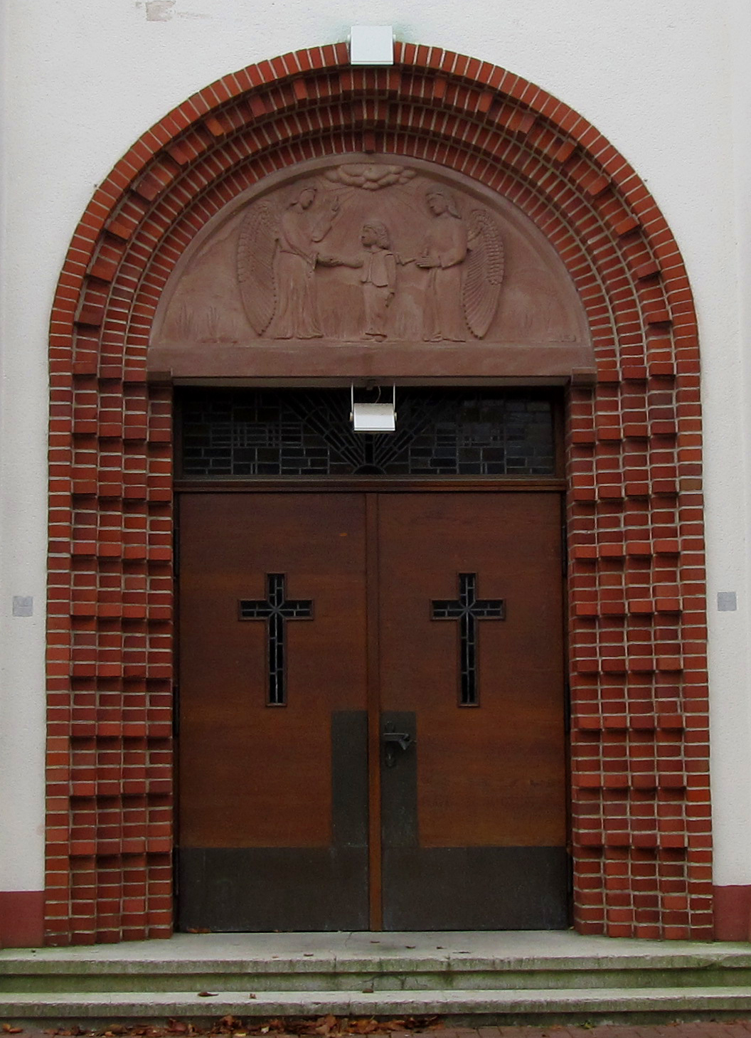 Hauptportal der katholischen Pfarrkirche „Zu den heiligen Schutzengeln“ in Schaffhausen, einem Ortsteil der Gemeinde Wadgassen, Saarland